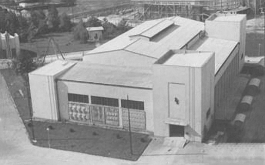 Београдски сајам је изграђен на основу одлуке Београдске општине 1936. године. Друштву за приређивање сајма и изложби је уступљен терен крај новоизграђеног Моста краља Александра. Прва фаза радова је започета у пролеће 1937. године, а завршена је до отварања, септембра 1937. Друга фаза, у којој су изграђени Турски и велики Немачки павиљон, завршена је 1938. Планирана је изградња и шестог југословенског павиљона, али су радови обустављени због избијања Другог светског рата. За време Другог светског рата га је Гестапо користио као концентрациони логор у ком је страдало око 48.000 људи.